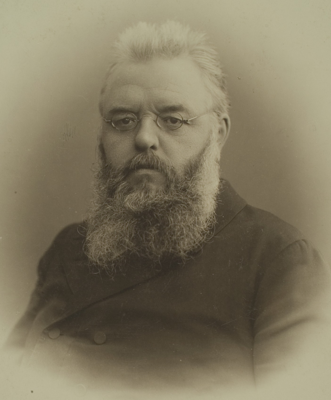 Karl Ludwig Julius Lilienthal, Jurist, 1896–1927 Professor in Heidelberg